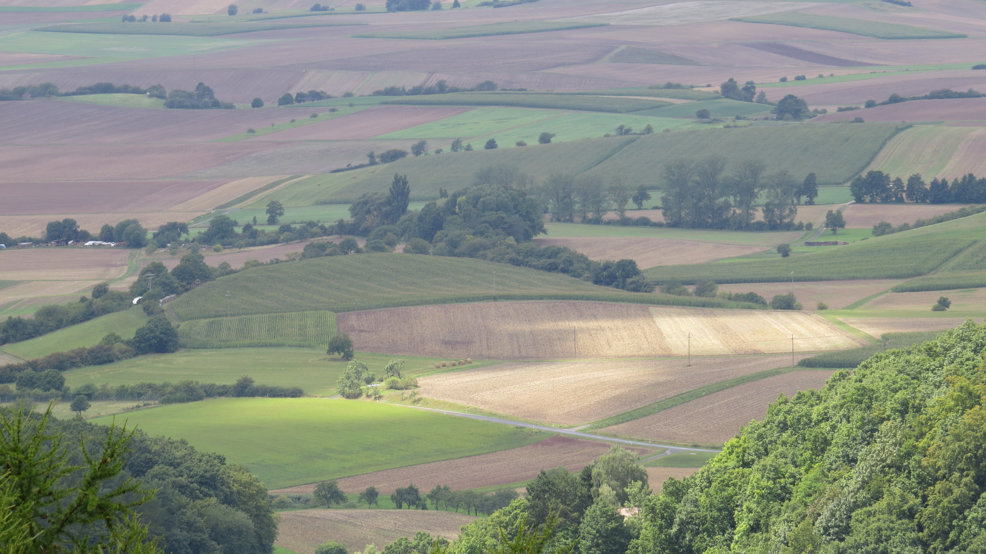 Blick von der Schwedenschanze bei Hofheim in Unterfranken